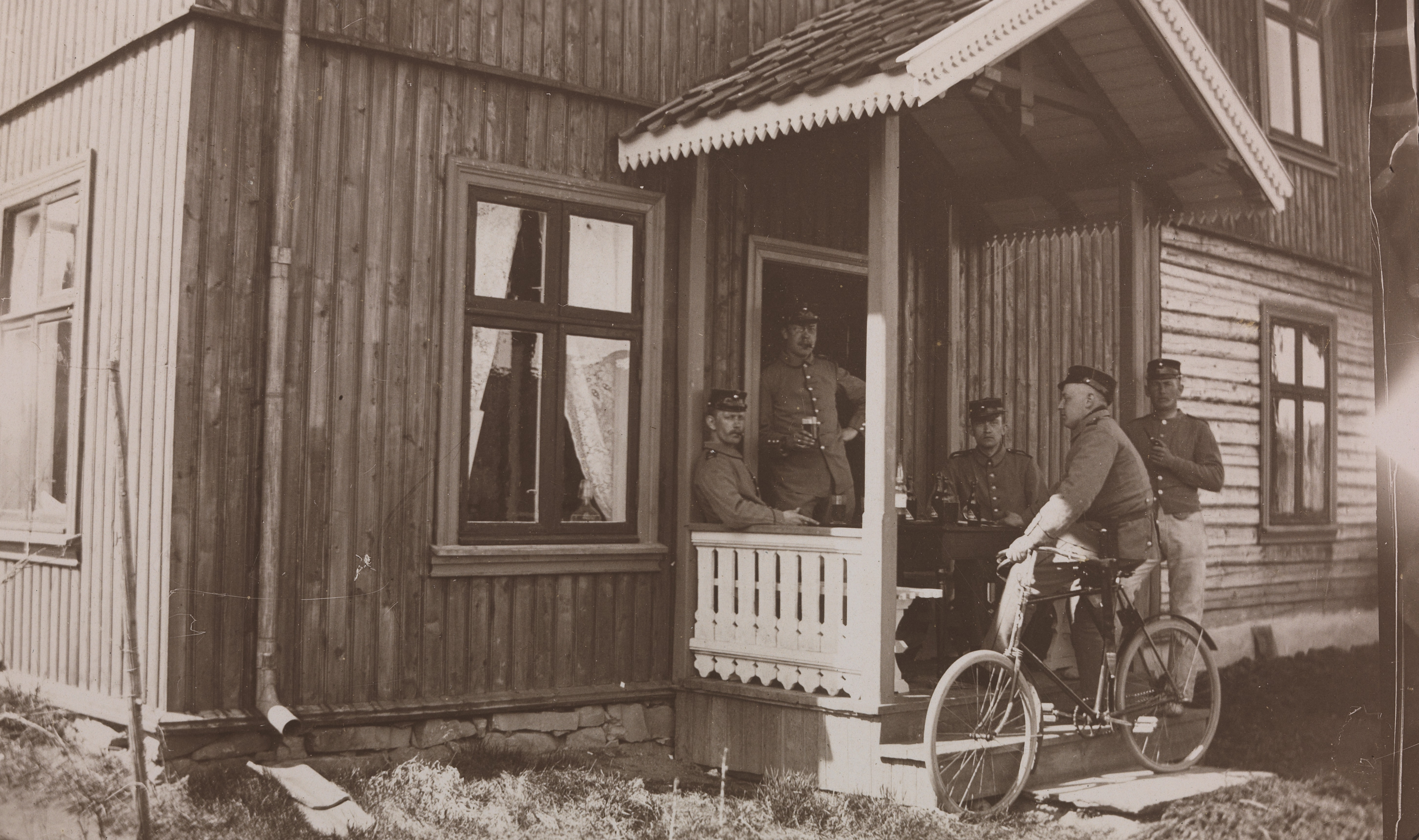 Soldater fra Hvalsmoen ekserserplass for Ingeniørregimentet (i Haugsbygd). Her slapper de av på en veranda. Depicted place: Buskerud, Ringerike